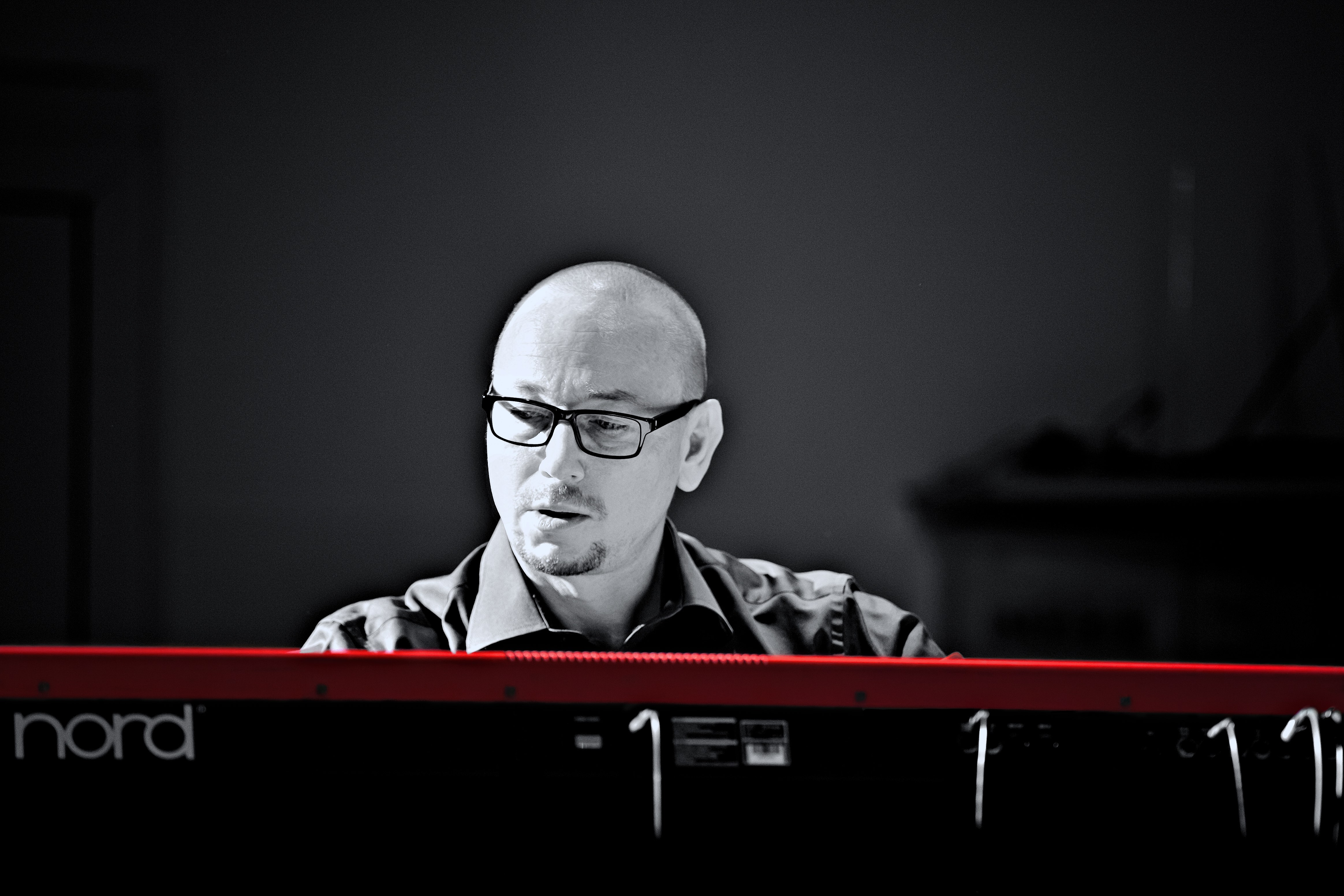 Harald Sulzbacher am Keyboard während eines Live-Konzertes